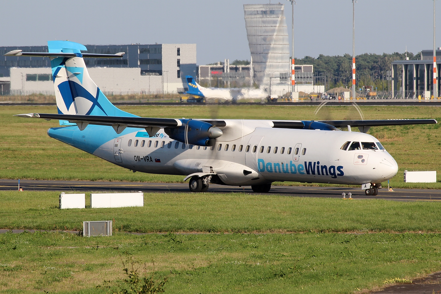 Eine ATR-72 der Danube Wings am Flughafen Berlin Schönefeld